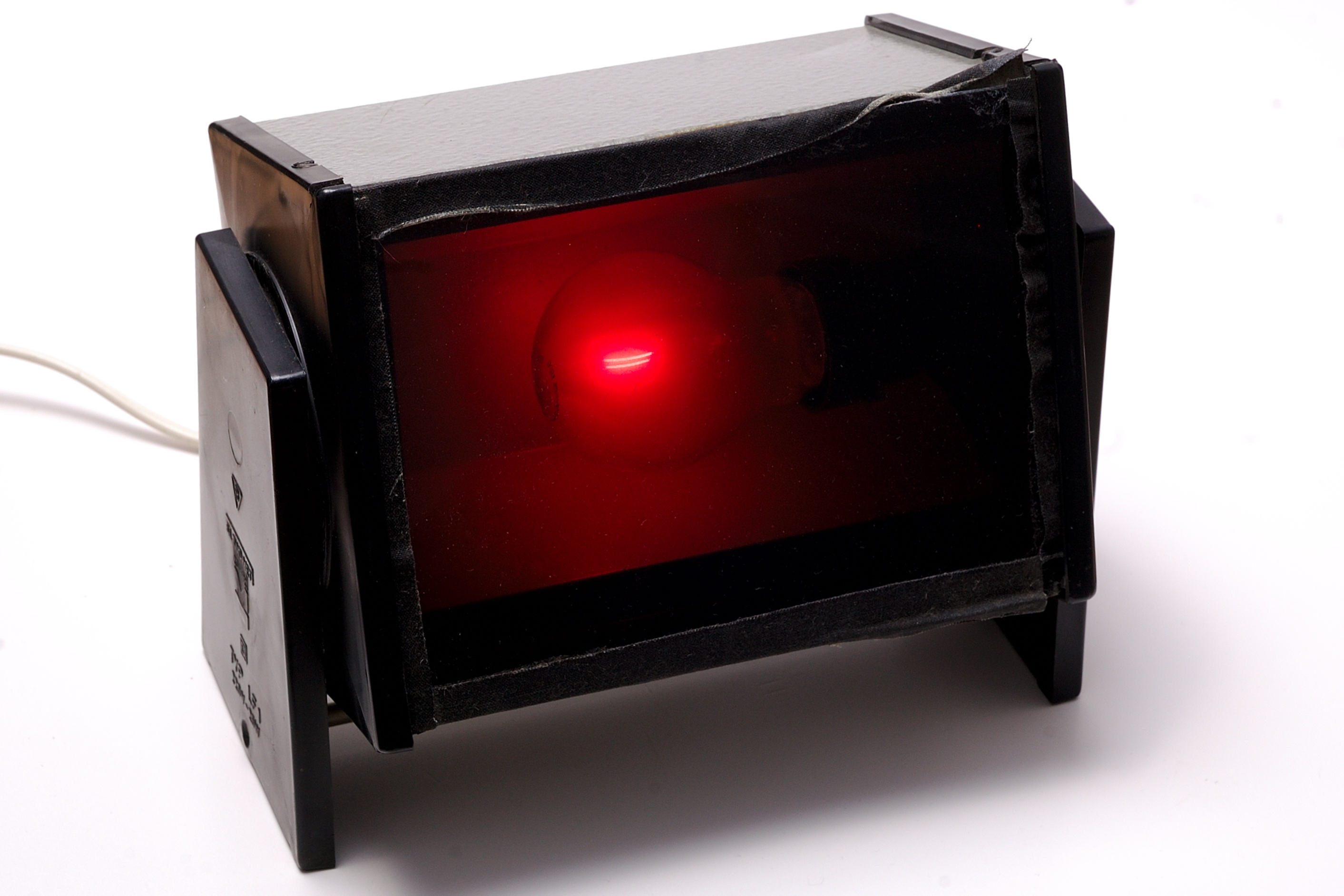 Dunkelkammerleuchte